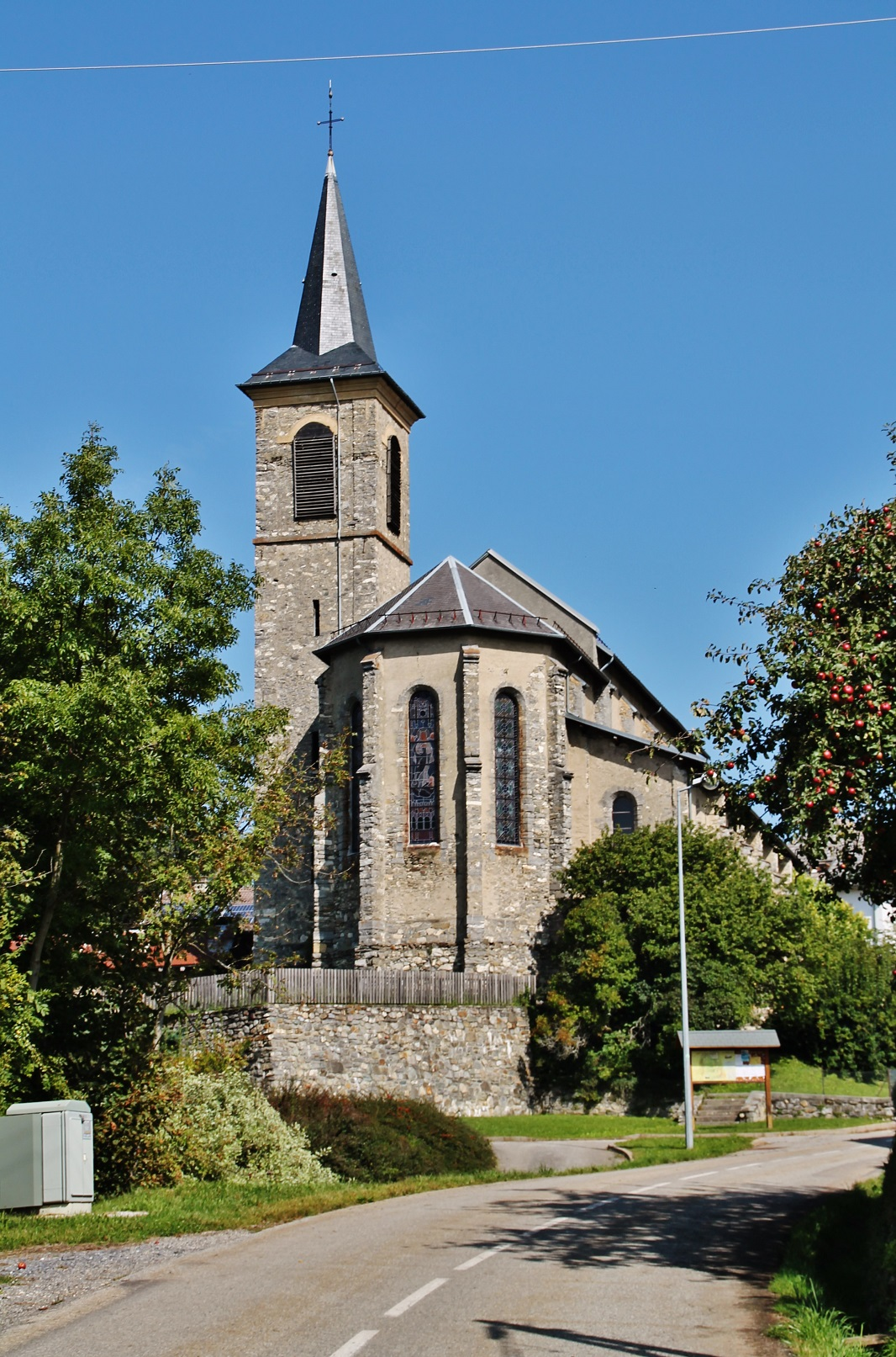 Notre-Dame de l'Assomption